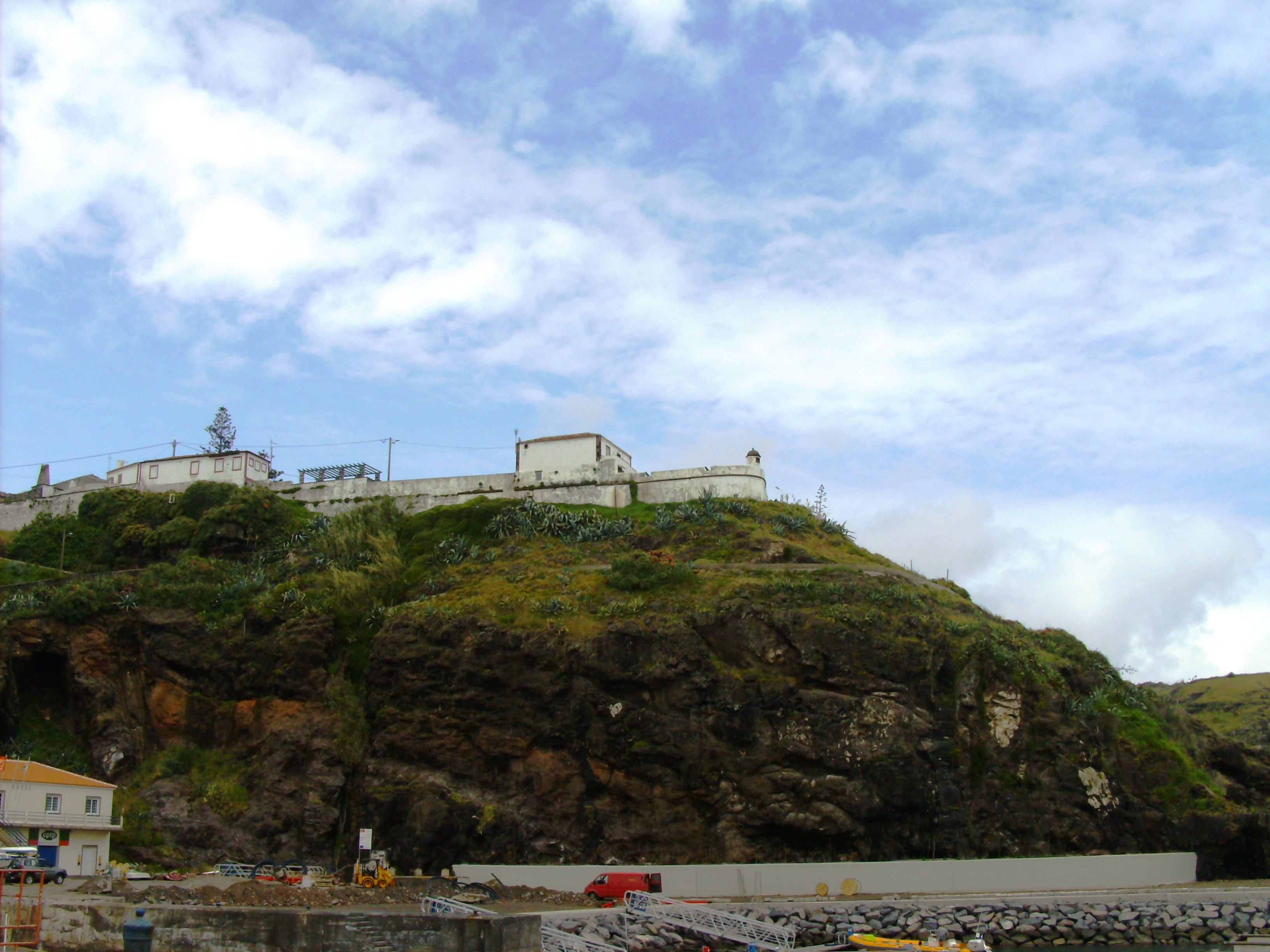 Forte de São Brás de Vila do Porto, Ilha de Santa Maria (Açores), Portugal.